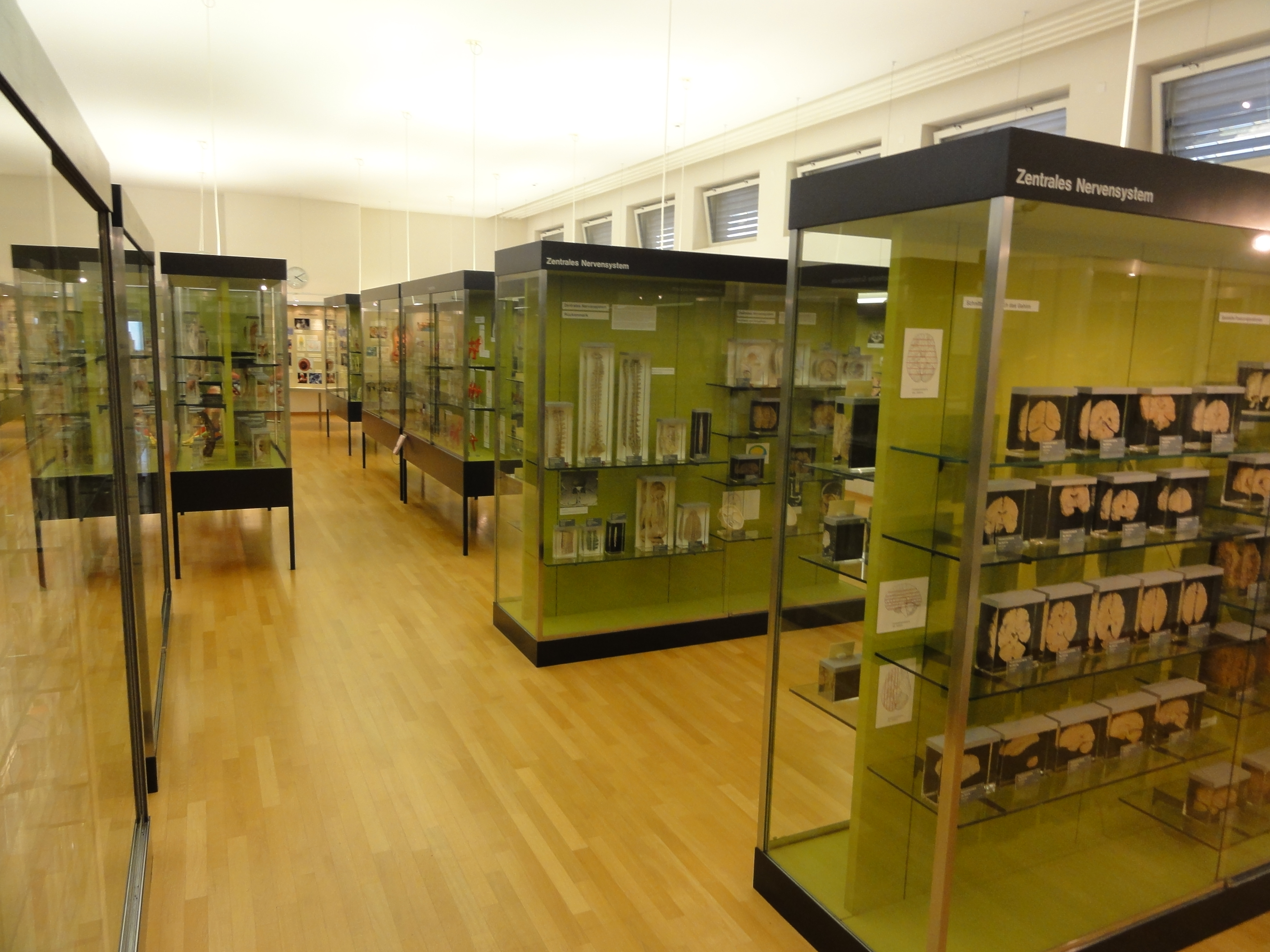 Basel — Anatomisches Museum der Universität